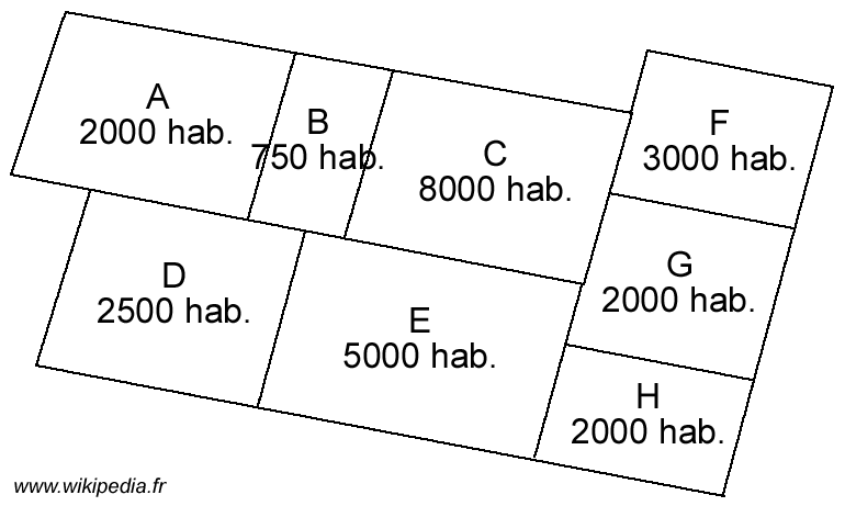 Schéma illustrant l'article sur la notion d'unités urbaines (0 sur 6)